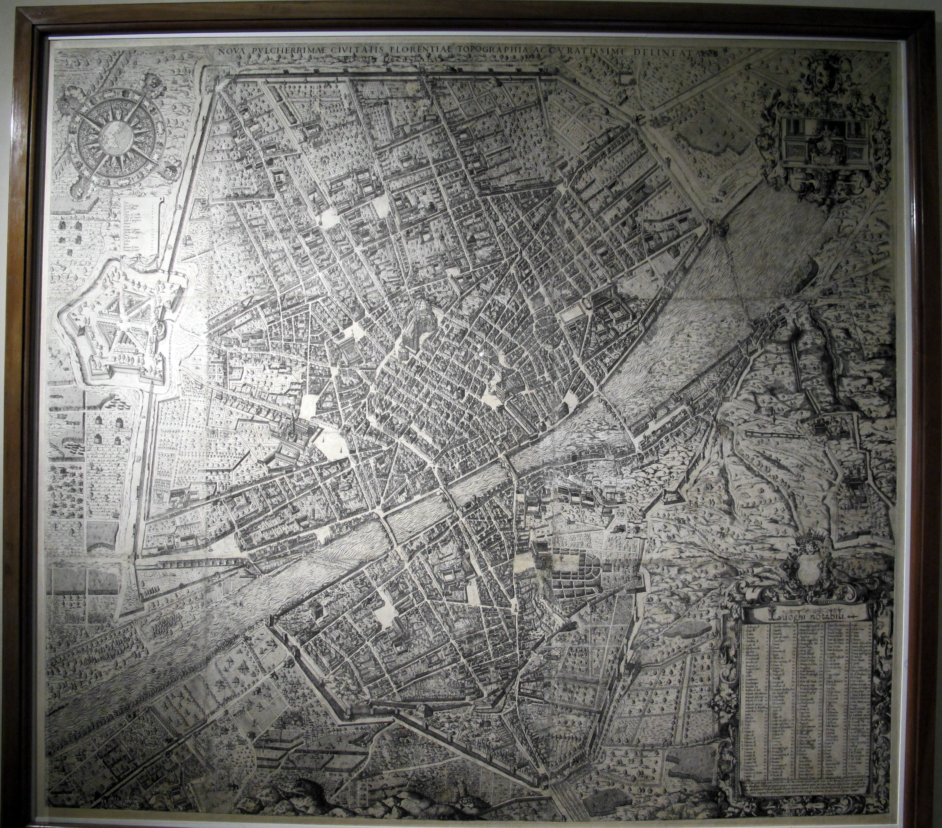 Pianta